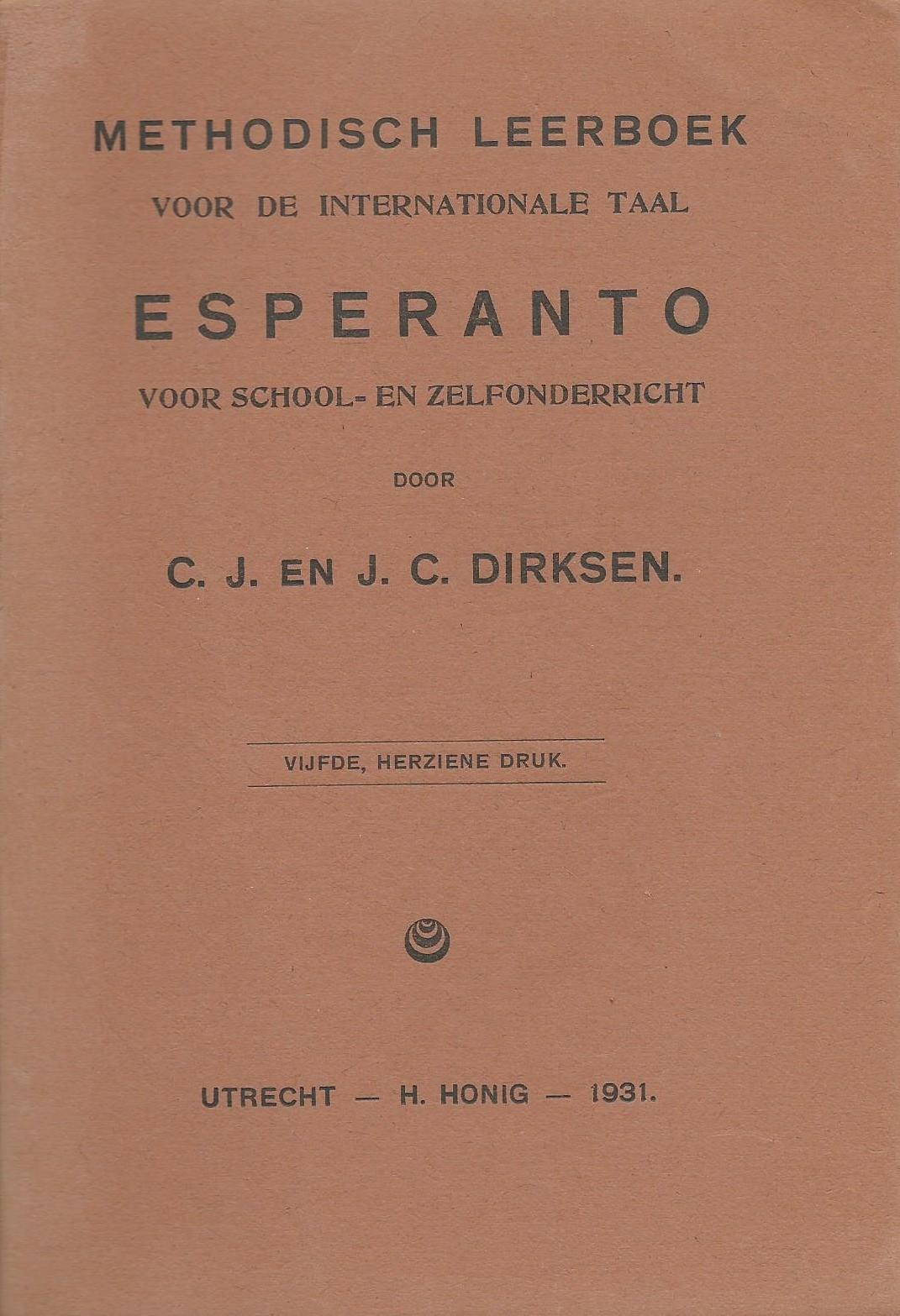 boekenkaft van "Methodisch Leerboek voor de Internationale Taal Esperanto voor School- en Zelfonderricht", 1931